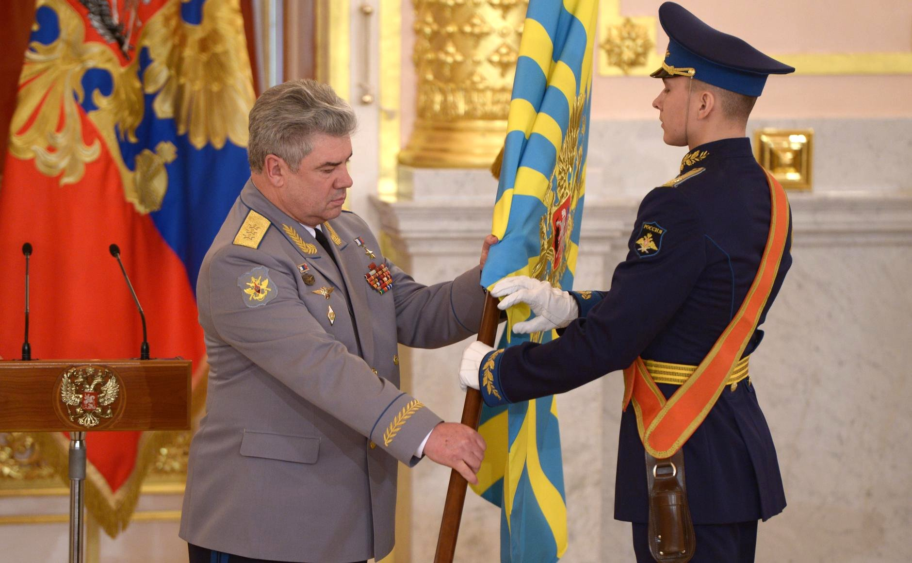 Церемония вручения Главнокомандующим ВС РФ Владимиром Путиным Боевого знамени Воздушно-космических сил главнокомандующему ВКС генерал-полковнику Виктору Бондареву